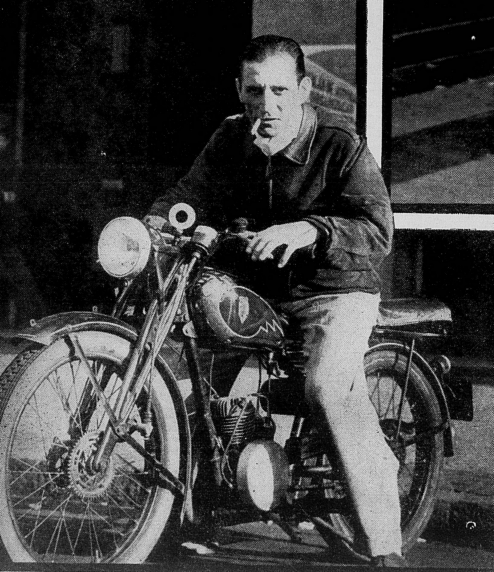 Cantor brasileiro Francisco Alves usando motocicleta para se locomover enquanto vigorava o racionamento de combustível durante a II Guerra Mundial, em 1942.